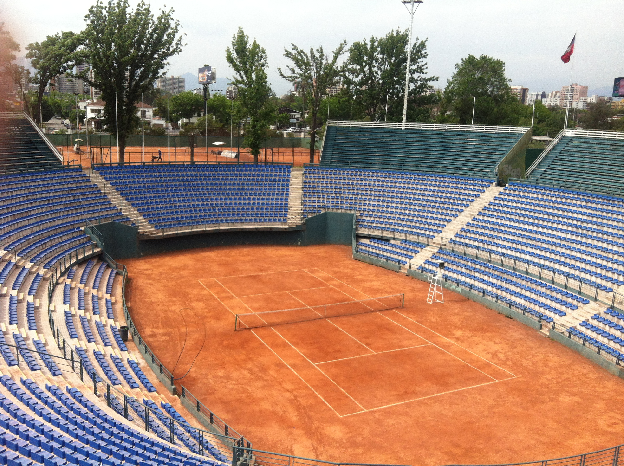 Court Central Estadio Nacional, Santiago